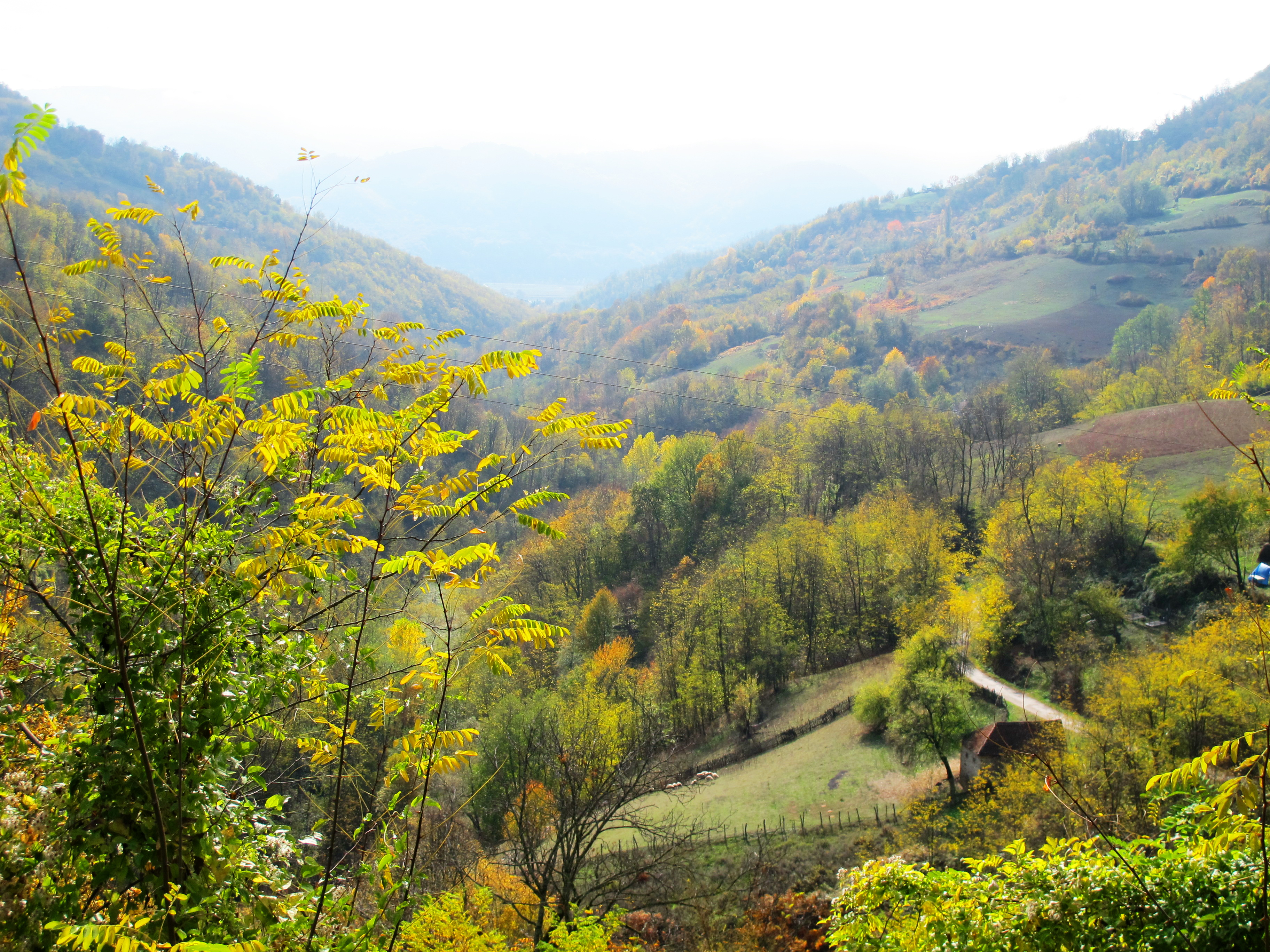 Цапарић.